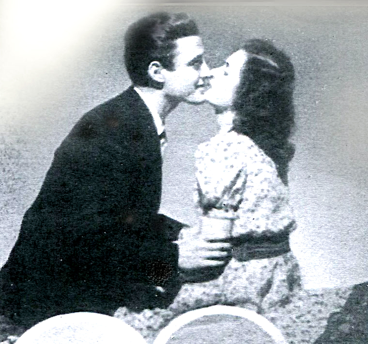 Armando Francioli ed Adriana Benetti, interpreti di "C'è sempre un ma" (Zampa, 1943)